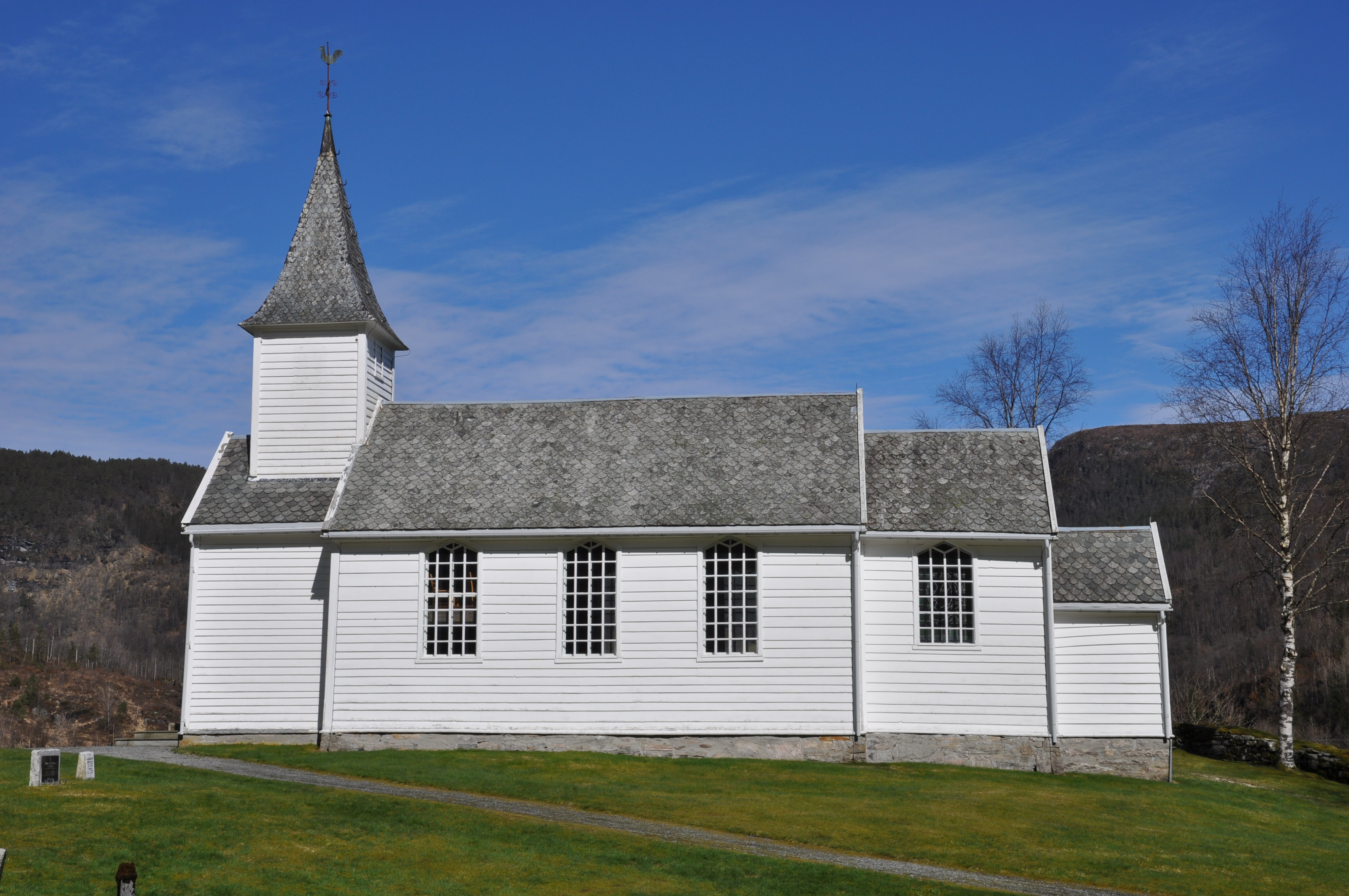 Guddal kyrkje står i Guddal søraust i Fjaler kommune i Sogn og Fjordane, og er ei langkyrkje som plar daterast til 1870, sjølv om delar av kyrkja er frå 1686. I 1870 vart den gamle kyrkja utvida, og samstundes fekk heile bygget ny kleding og det vart lagd nytt golv og panel inne. Kyrkja fekk òg eit tårn. 25. september 1870 vart kyrkja vigsla på nytt. Til jubileet i 1970 vart kyrkja pussa opp igjen. I mellomalderen stod det ei stavkyrkje i Guddal, denne vart truleg riven på 1600-talet. Guddal kyrkje høyrer til Fjaler sokn i Sunnfjord prosti. Guddal var tidlegare eit eige kyrkjesokn, men sokna i det tidlegare prestegjeldet er no ihopslegne til eitt sokn. (Kjelde: Nynorsk Wikipedia)